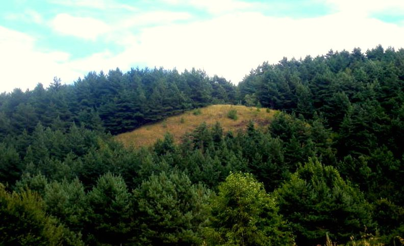 Chránené prírodné územie Dunitova skalka